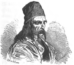 Szene aus Wilhelm Hauffs Märchenzyklus Die Karawane: Der Erzähler Zaleukos (Die Geschichte von der abgehauenen Hand)